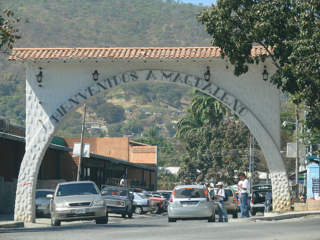 Magdaleno es la parroquia del Municipio Zamora, Estado Aragua. Entre Maracay y Güigüe. Tierra de carpinteros. Mucha artesanía.